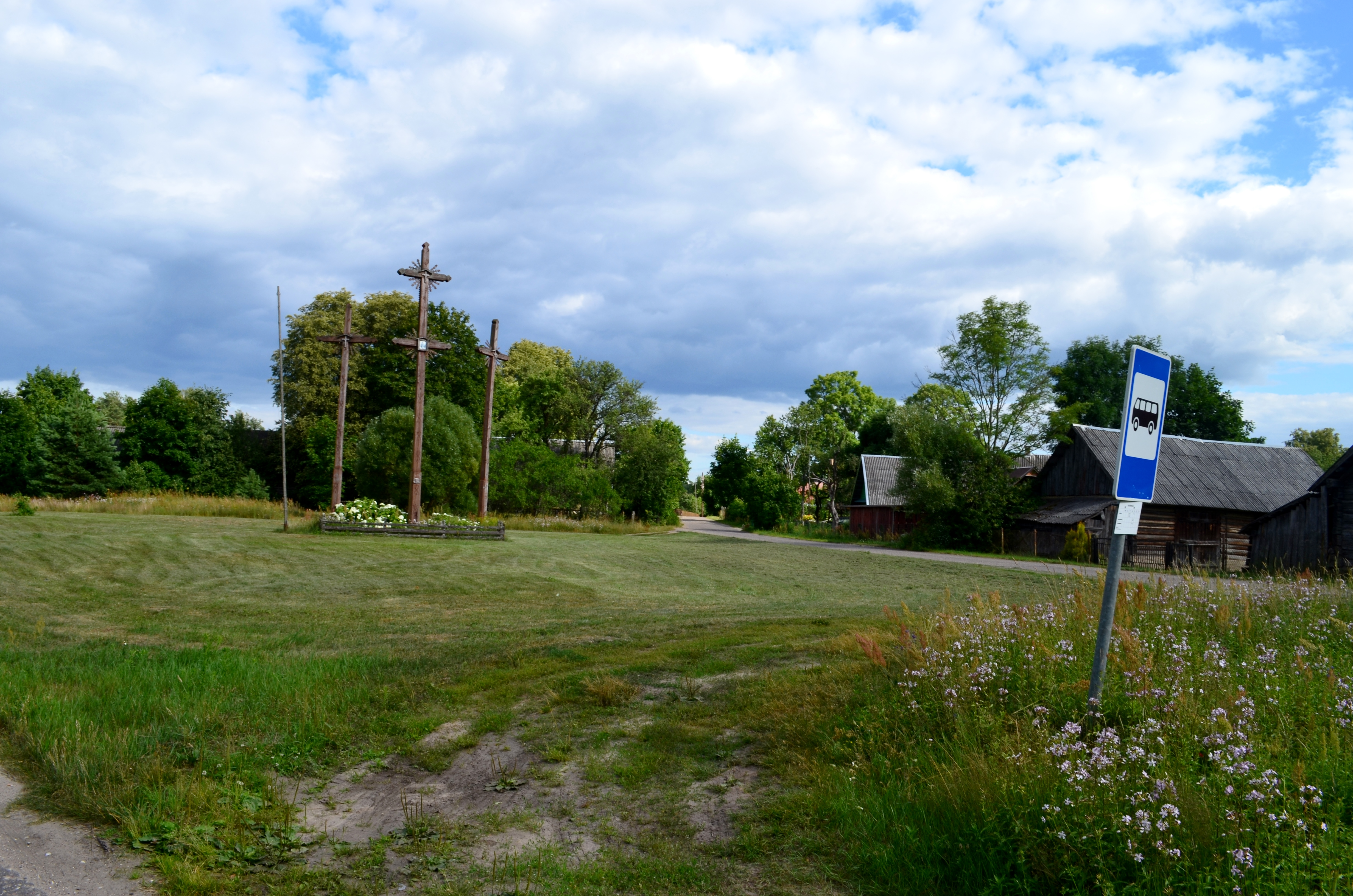 Ašašninkai, Varėnos r.